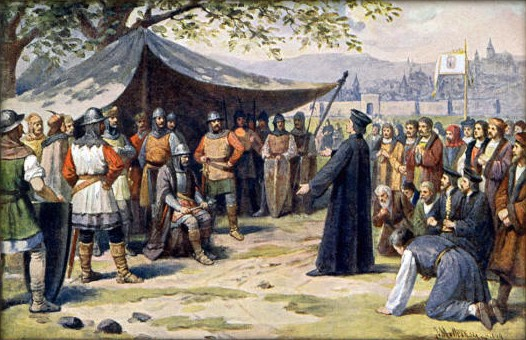 Josef Mathauser - Poselství Pražanů v táboře Žižkově roku 1424